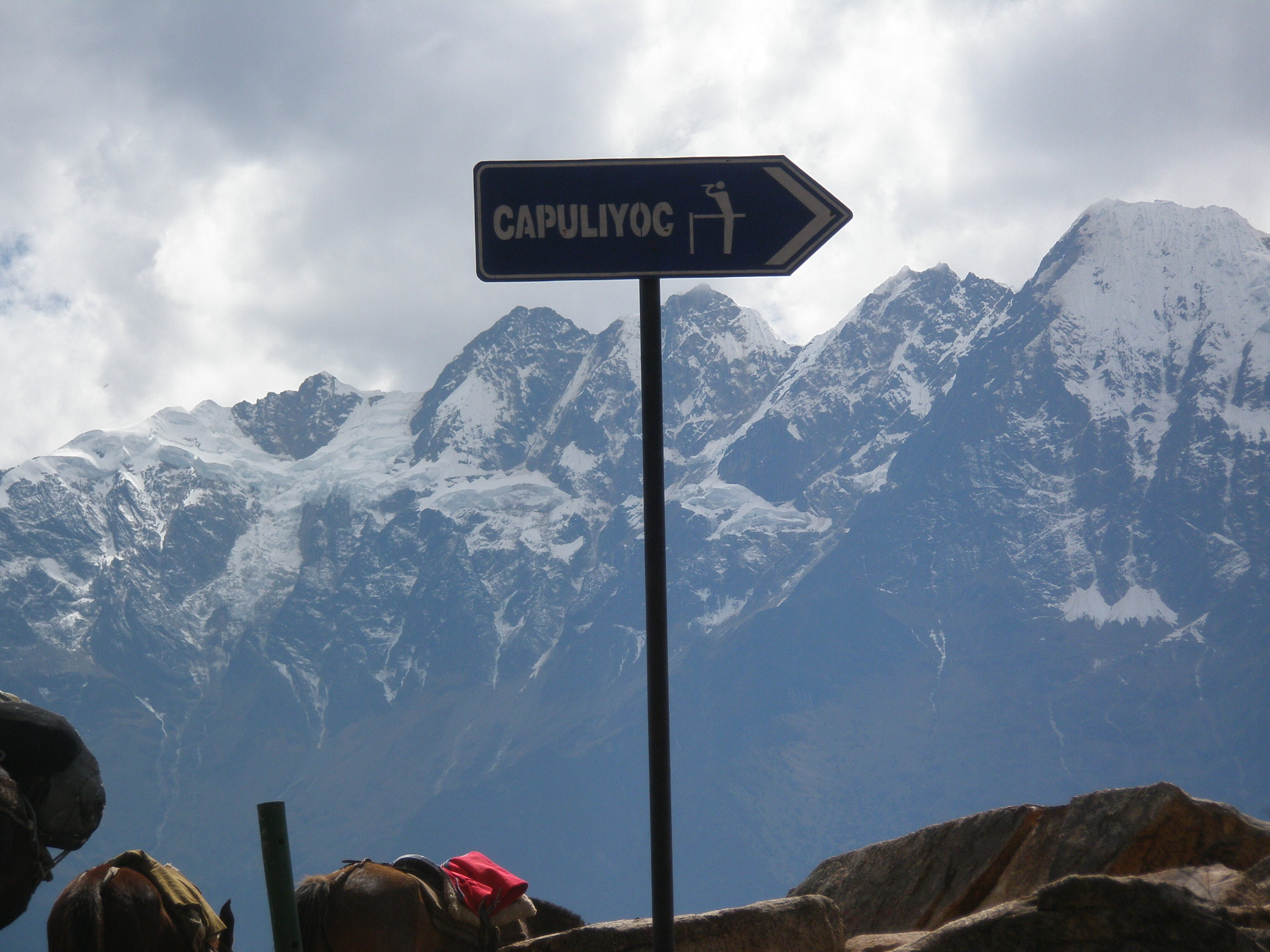 Nevados en el camino a Choquequiraw.